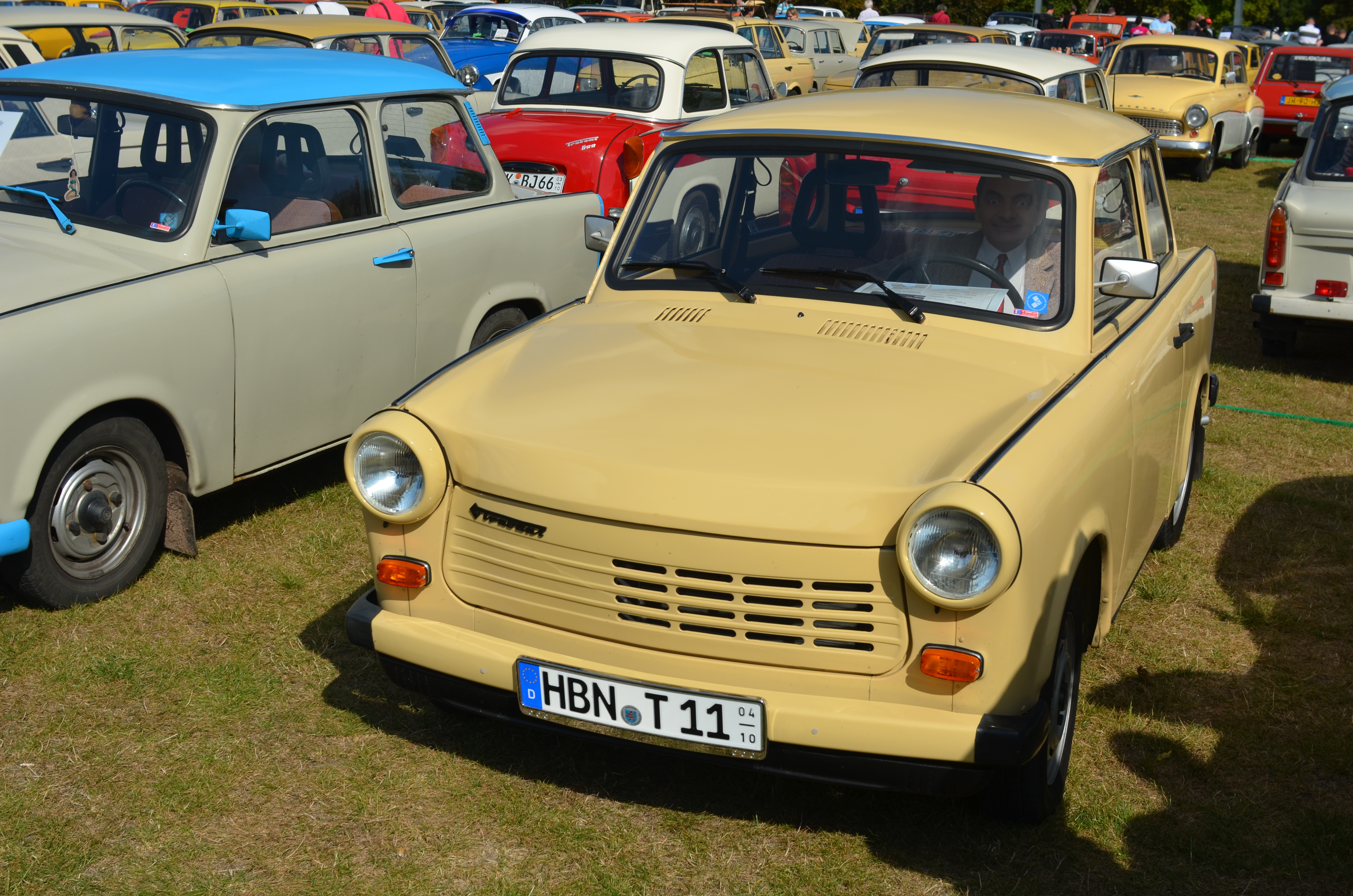 Trabant